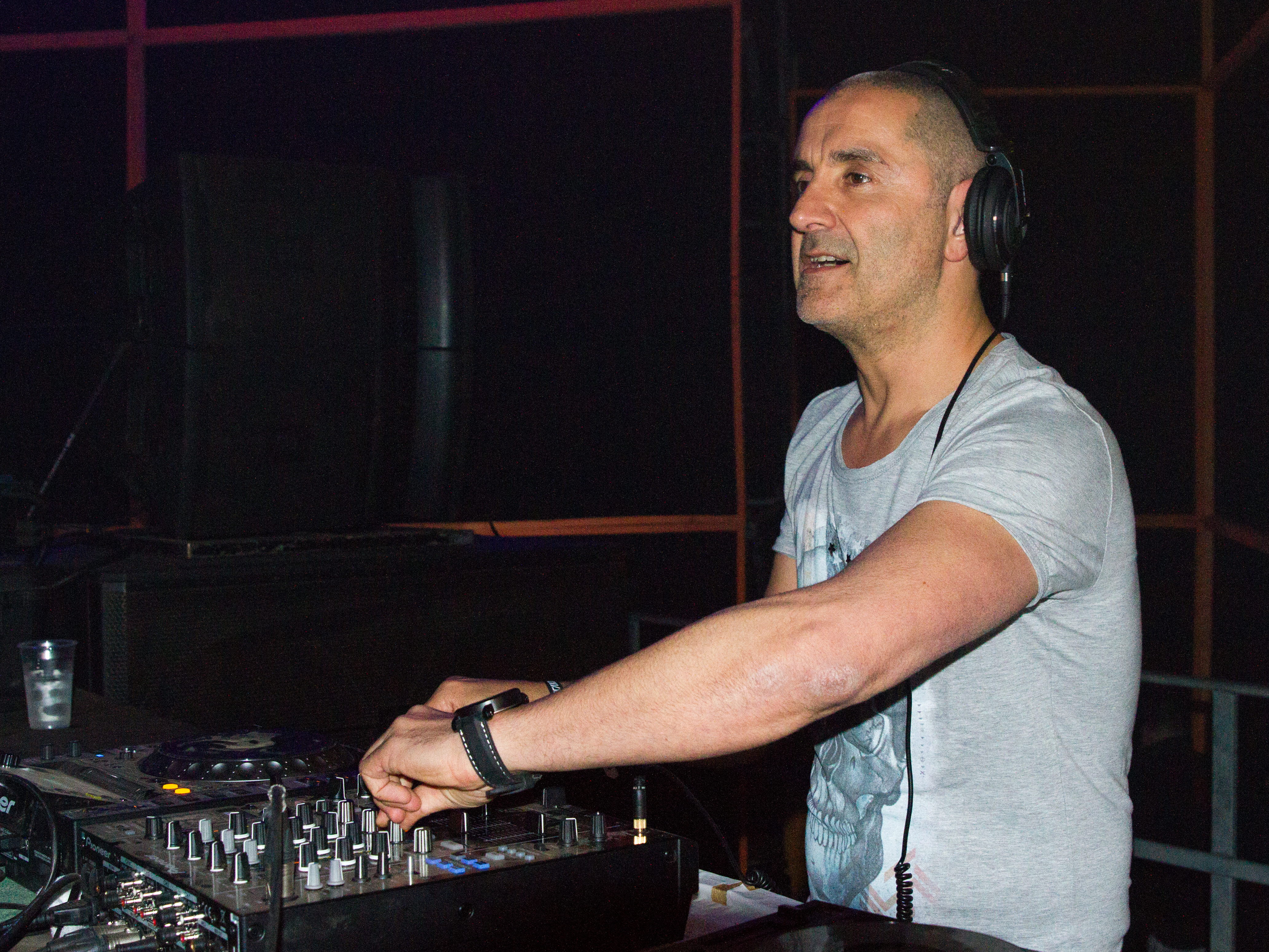 The Prophet (Dov J. Elkabas) beim 14. Airbeat-One Dance Festivals das vom 16. bis 19. Juli 2015 auf dem Flugplatz Neustadt-Glewe stattfand.